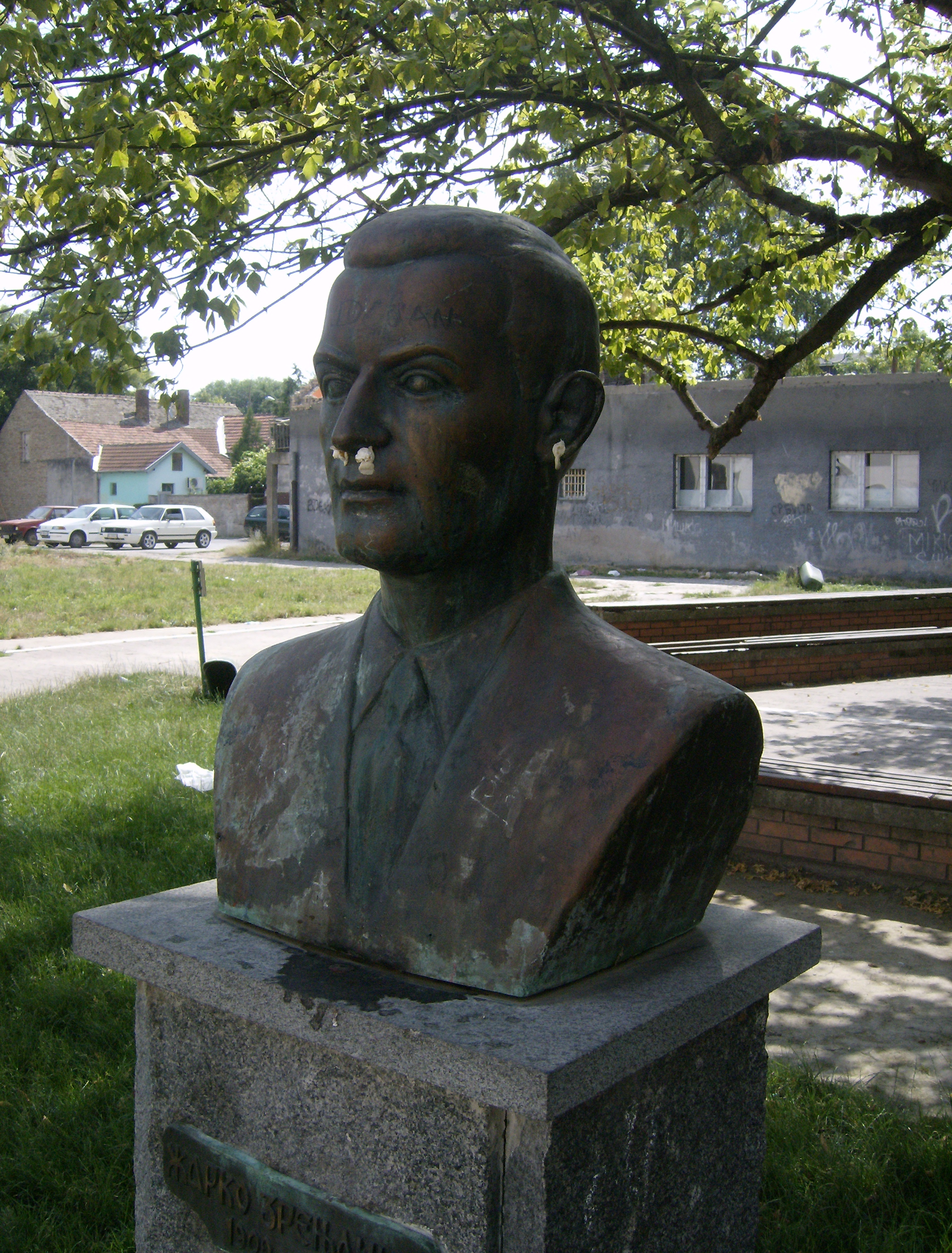 Bronzana bista Žarka Zrenjanina koja je bila postavljena ranije u školskom dvorištu